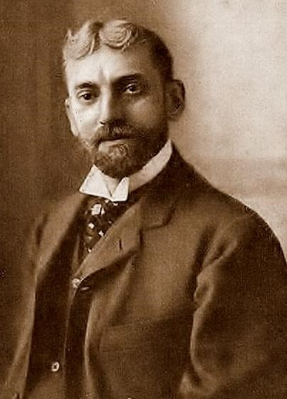 Hubertus Christiaan (Hubert) de Blanck (14 juni 1856 - 28 november 1932) was een Cubaanse pianist, componist en pedagoog van Nederlandse afkomst.